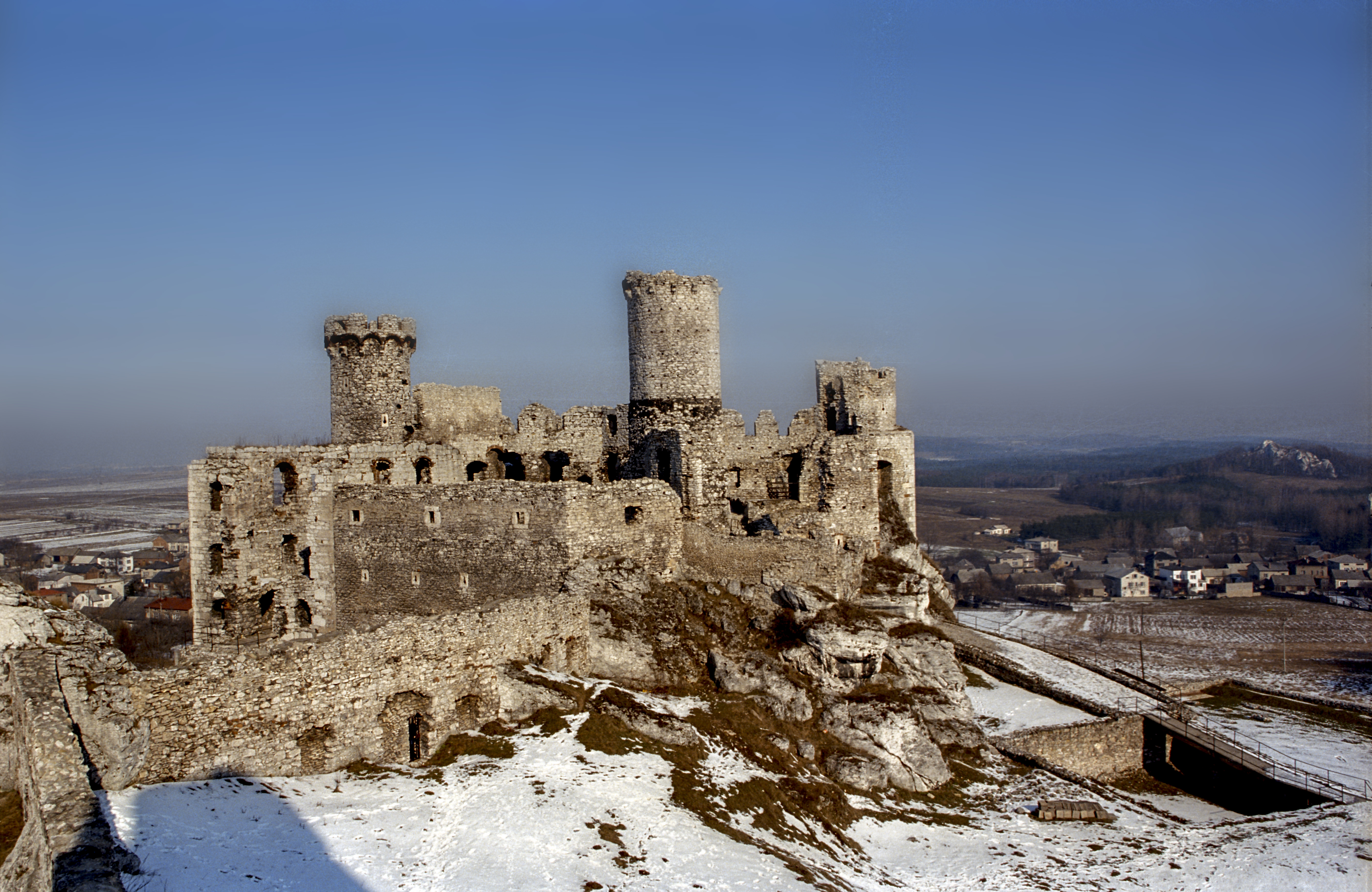 Poland, Jura, Ogrodzieniec Castle